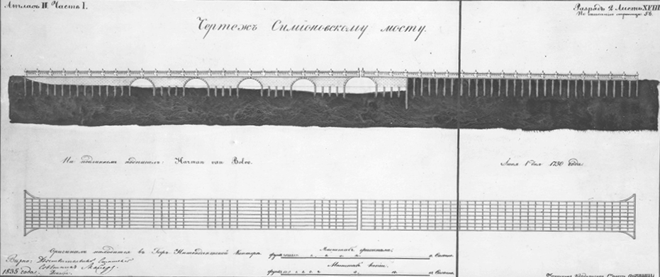 Симеоновский мост через р. Фонтанку до перестройки 1784—1785 гг.